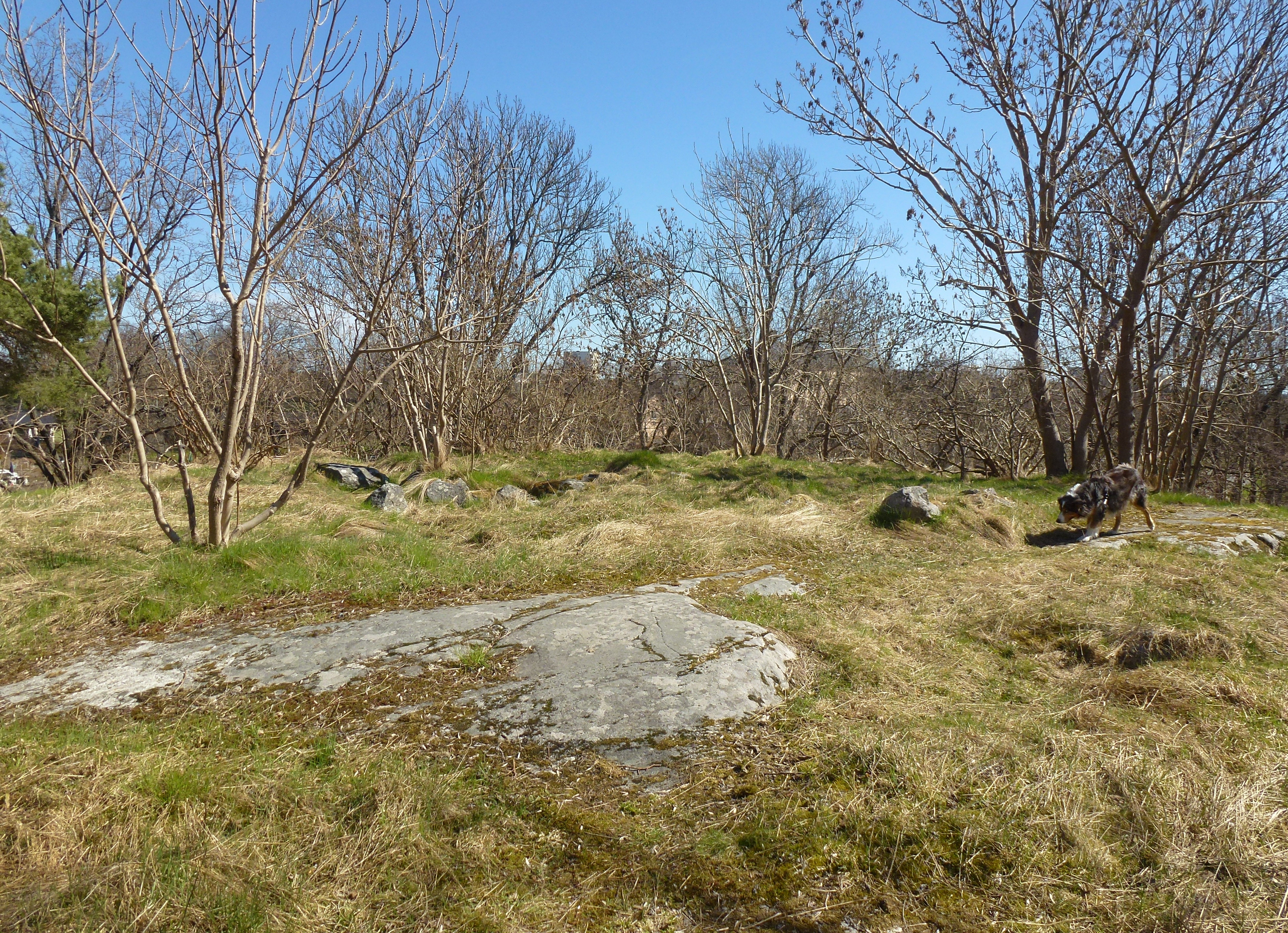 Hässelby slott kvarnbacken, platsen för Hässelby kvarn